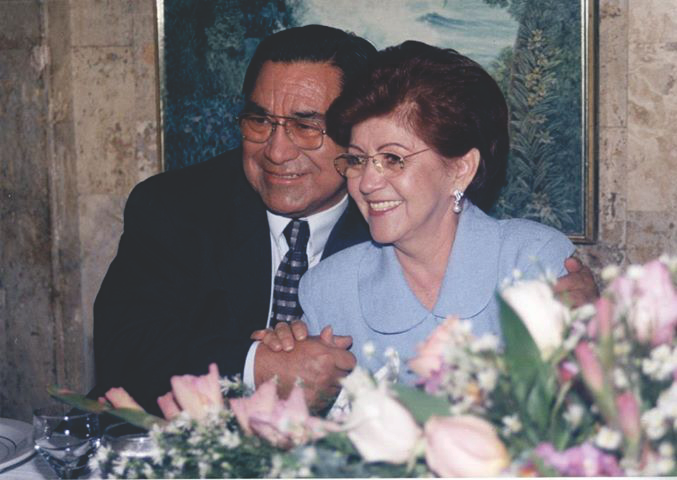 Fundadores CEPC